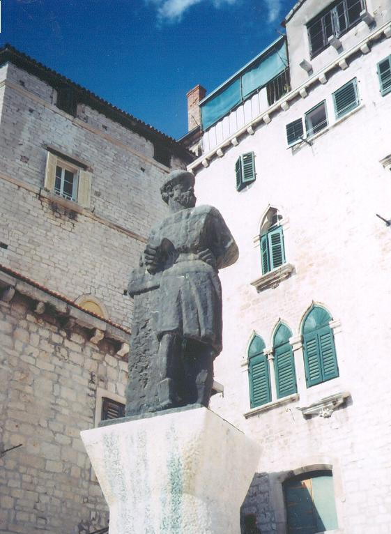 Statua di Giorgio da Sebenico (detto anche Giorgio di Matteo) a Sebenico